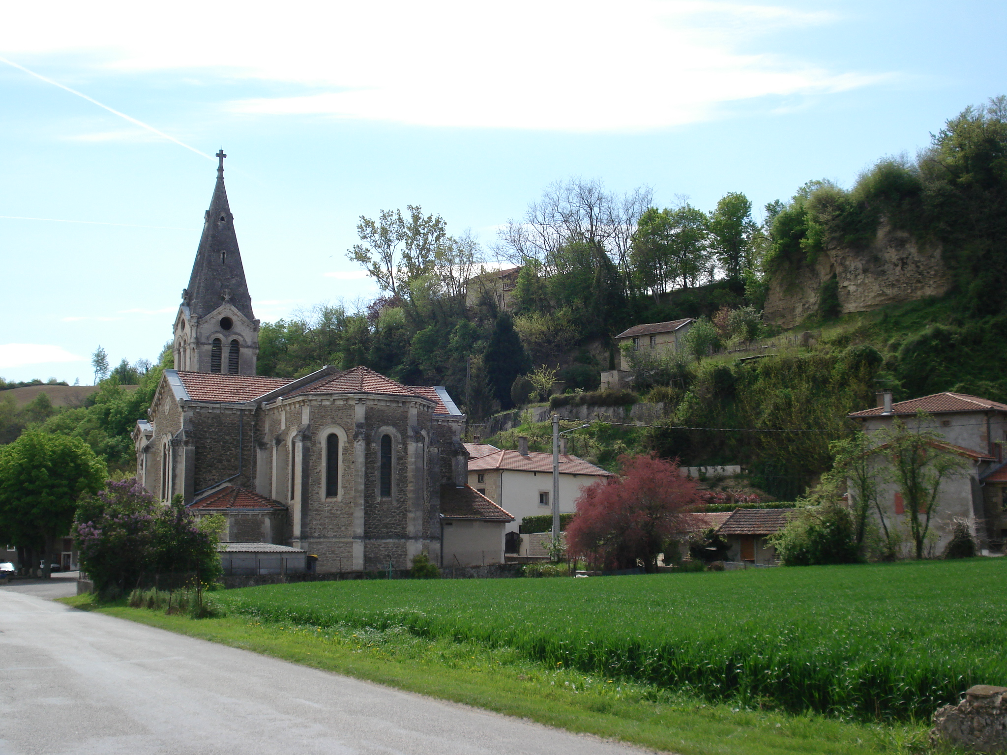 village de Crépol dans le nord de la Drôme